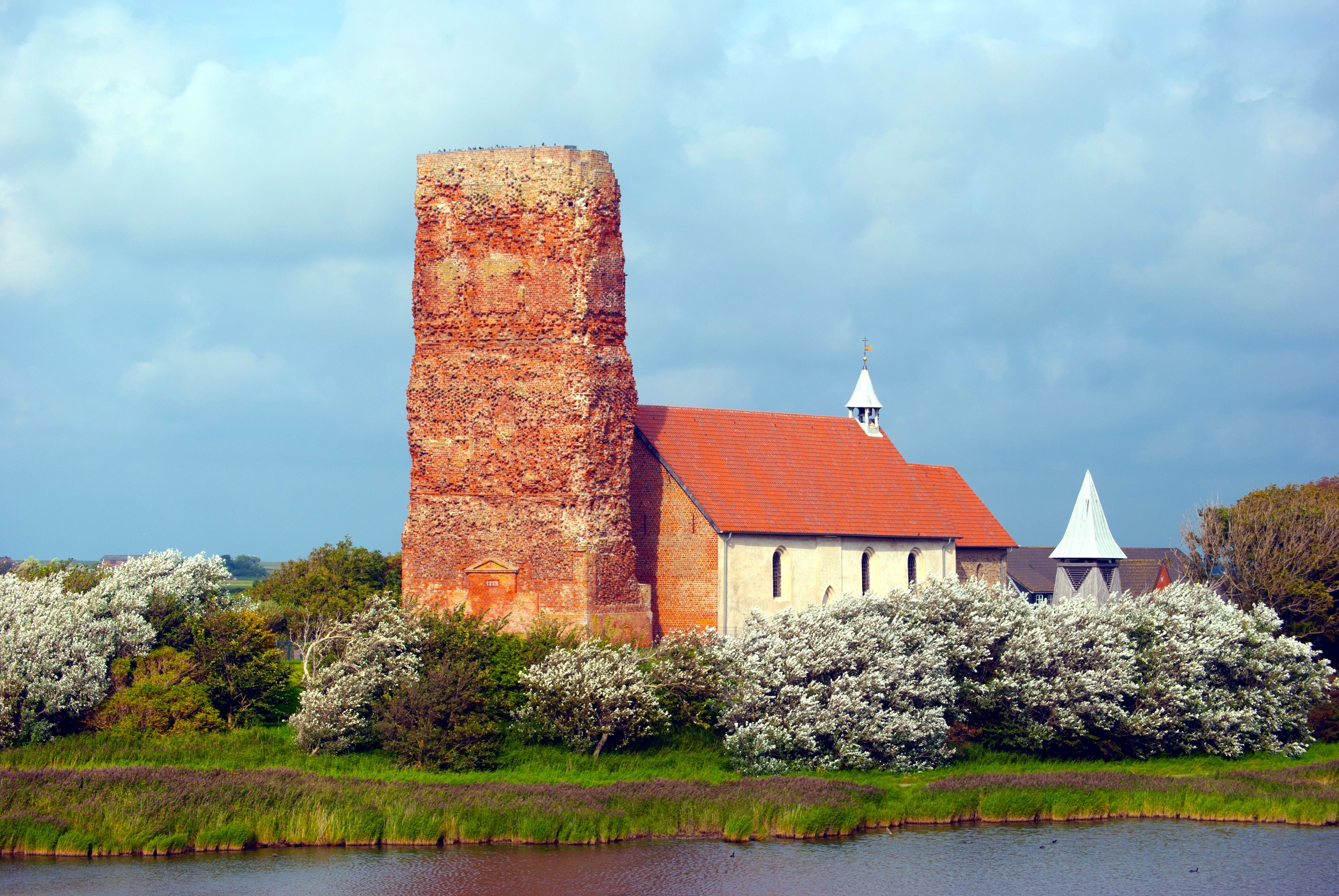 Die Kirche St.Salvator liegt im Westteil der Nordseeinsel Sie wurde im 11. Jahrhundert erbaut. Die alte Turmruine ist heute das Wahrzeichen der Insel Pellworm.